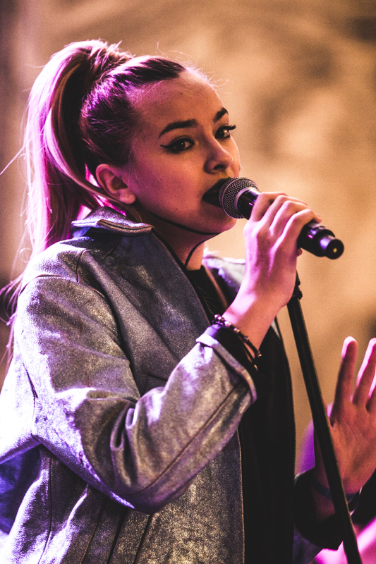 Natalia Nykiel, piosenkarka.